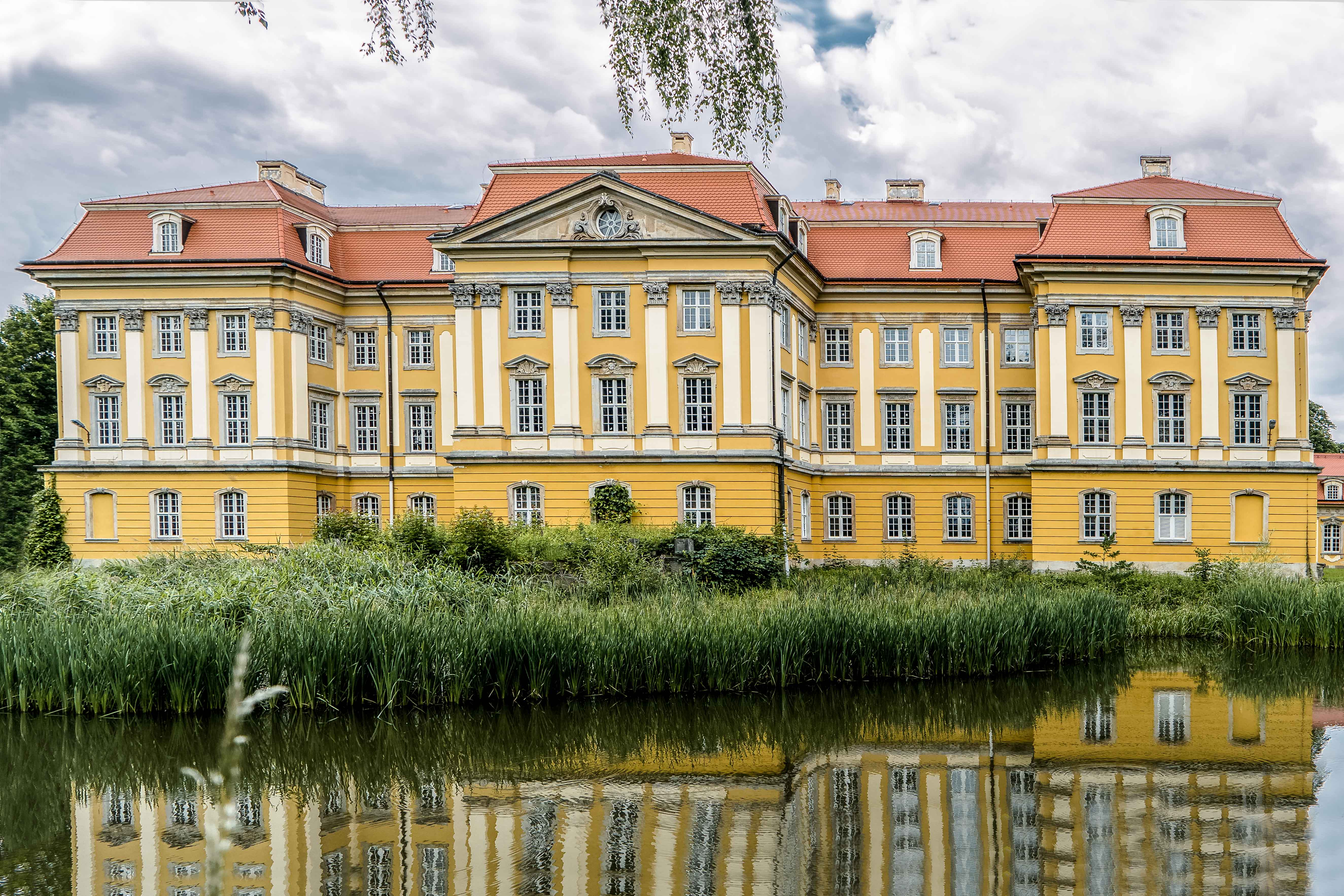 Palac Radomierzyce (Stift Joachimstein Radmeritz, Rückseite)